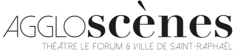 Logo d'aggloscènes en 2017